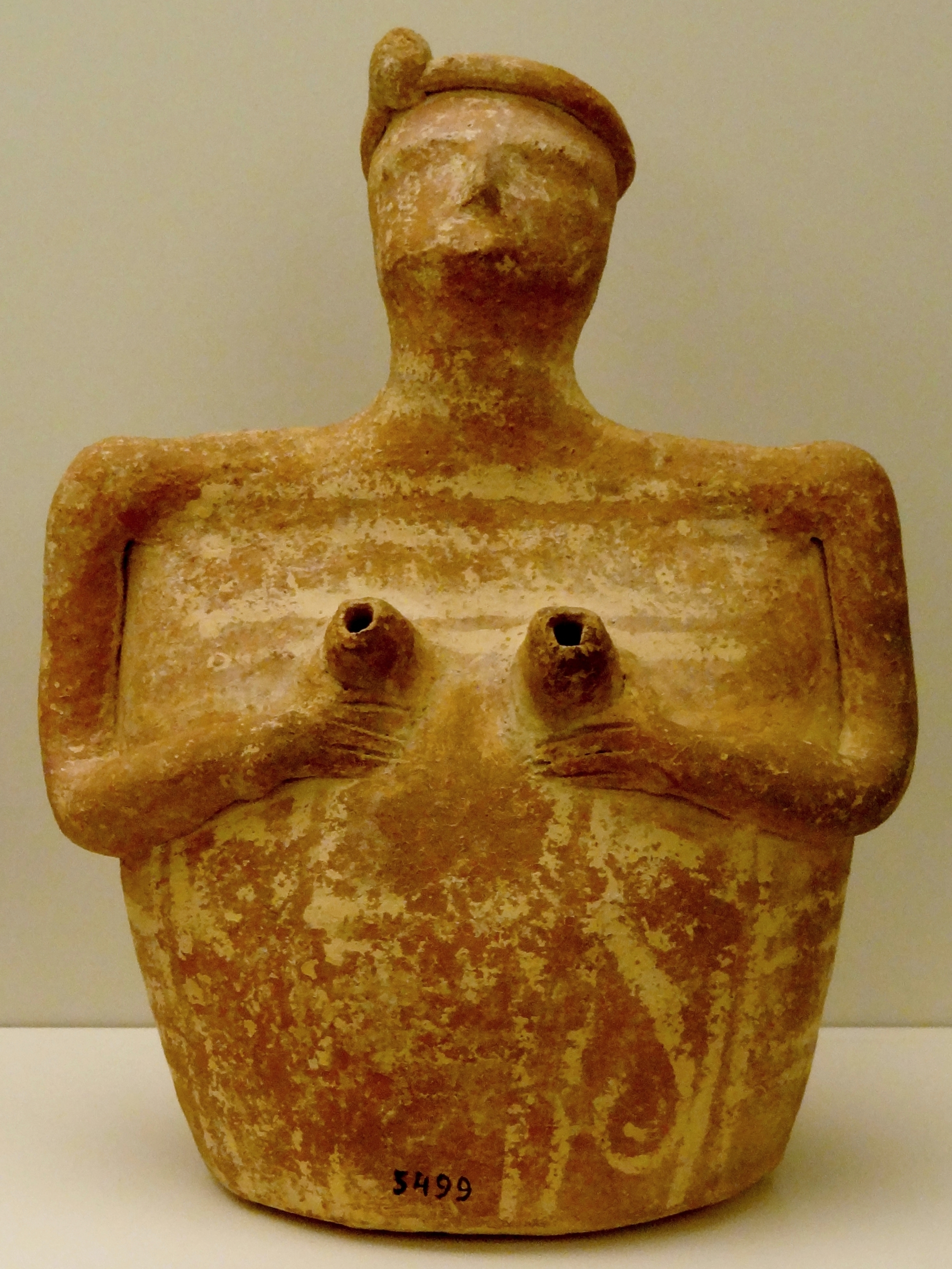 Tonrhyton in weiblicher Gestalt (Höhe 19 cm, Vorpalastzeit (FM III), 2300–2000 v. Chr.) aus Grab XIII auf der Insel Agios Nikolaos in Mochlos, ausgestellt im Archäologischen Museum Iraklio, Kreta, Griechenland